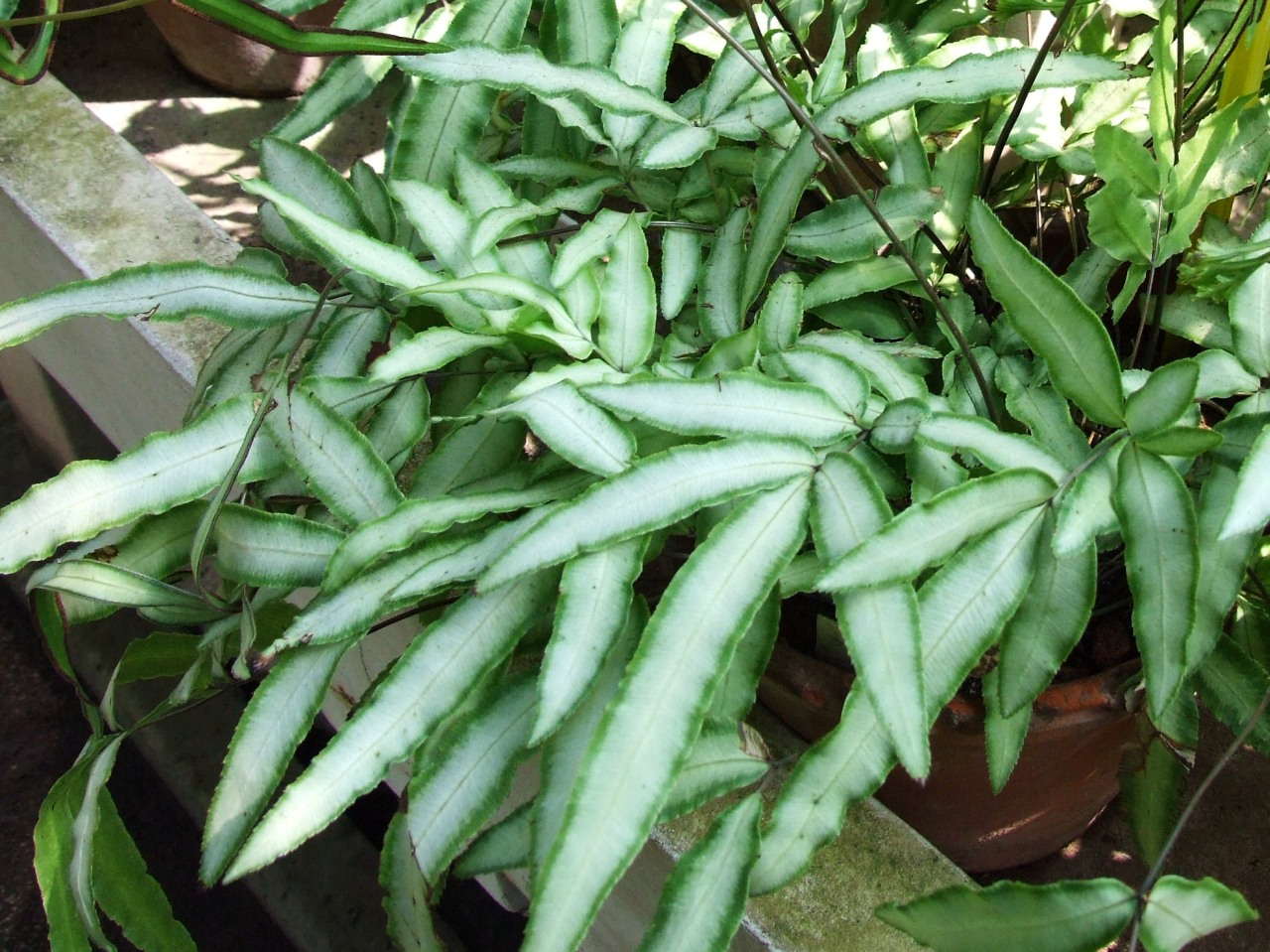 Pteris cretica 'Albo-lineata'